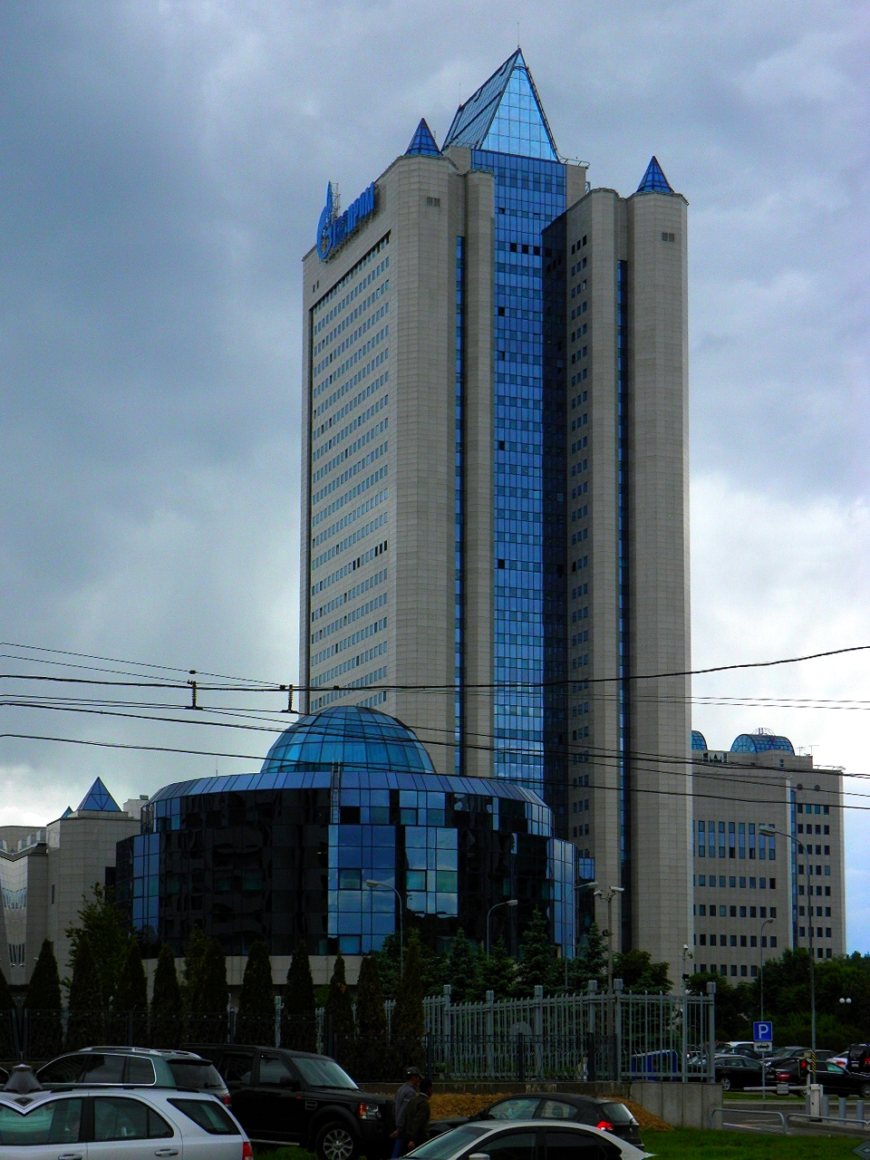 ГАЗПРОМ